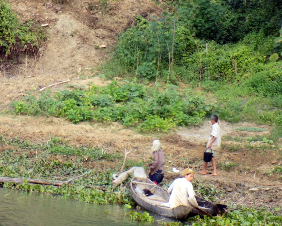 কাপ্তাই লেক,রাঙ্গামাটি